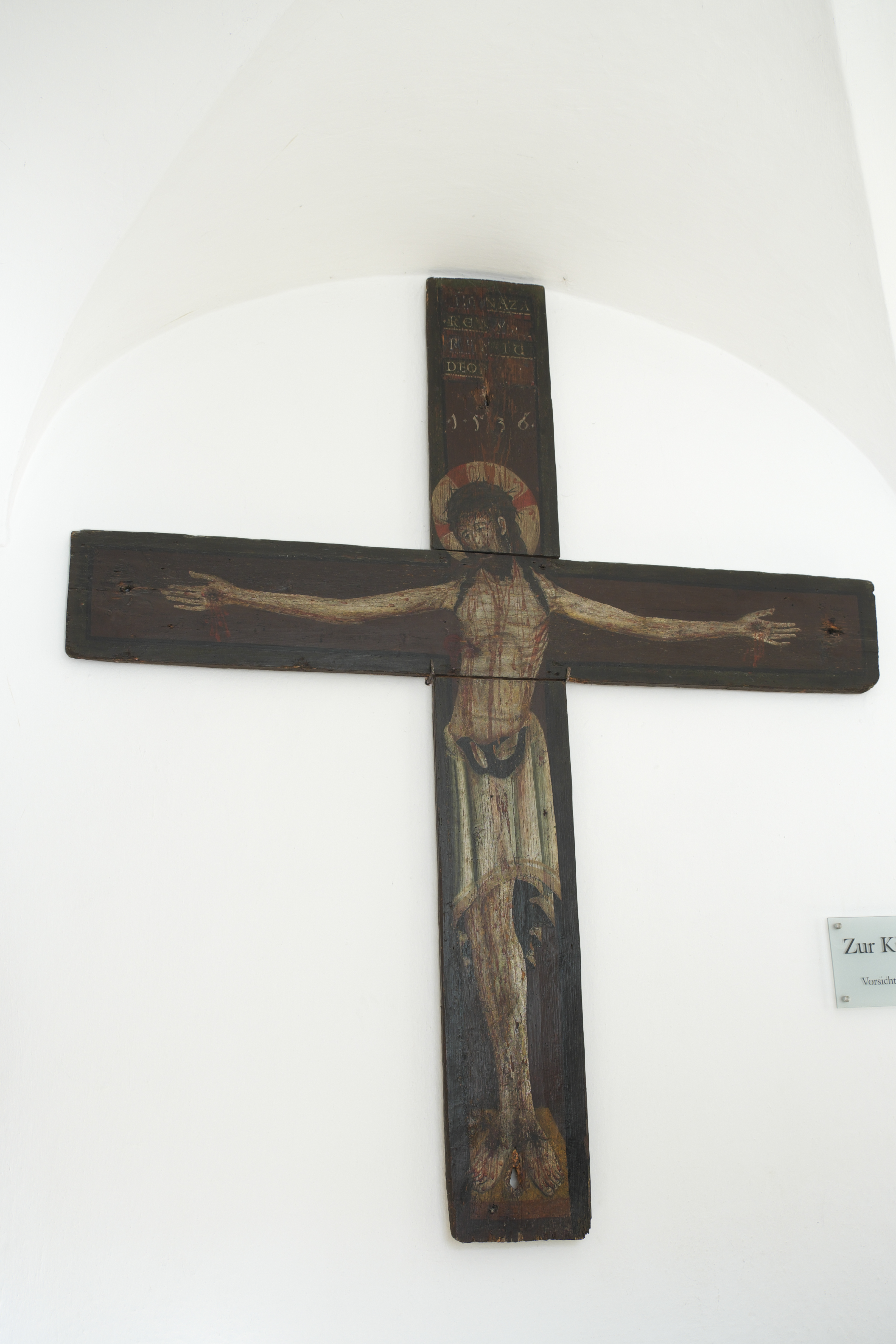 Äbtissinnengang des Benediktinerinnenklosters Frauenchiemsee auf der Fraueninsel im Landkreis Rosenheim (Bayern/Deutschland), Kruzifix mit gemaltem Korpus